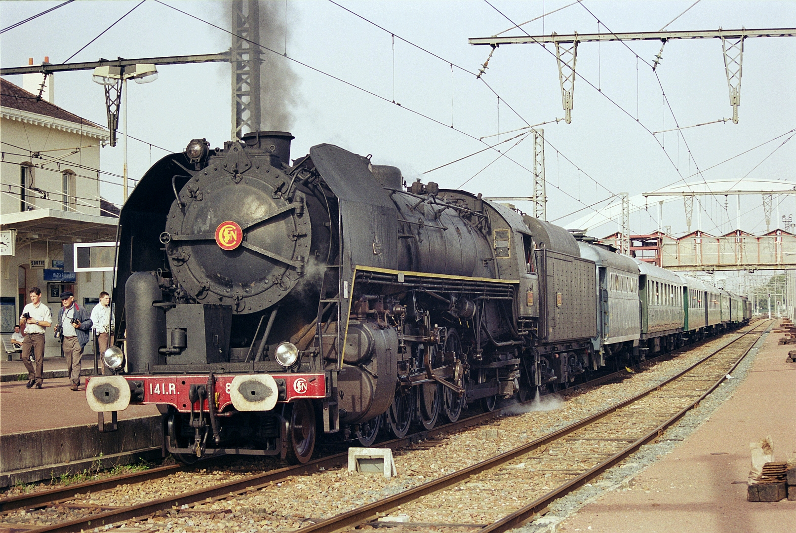 La 141 R 840 en gare de Massy-Palaiseau Grande Ceinture, le 13 octobre 2001.